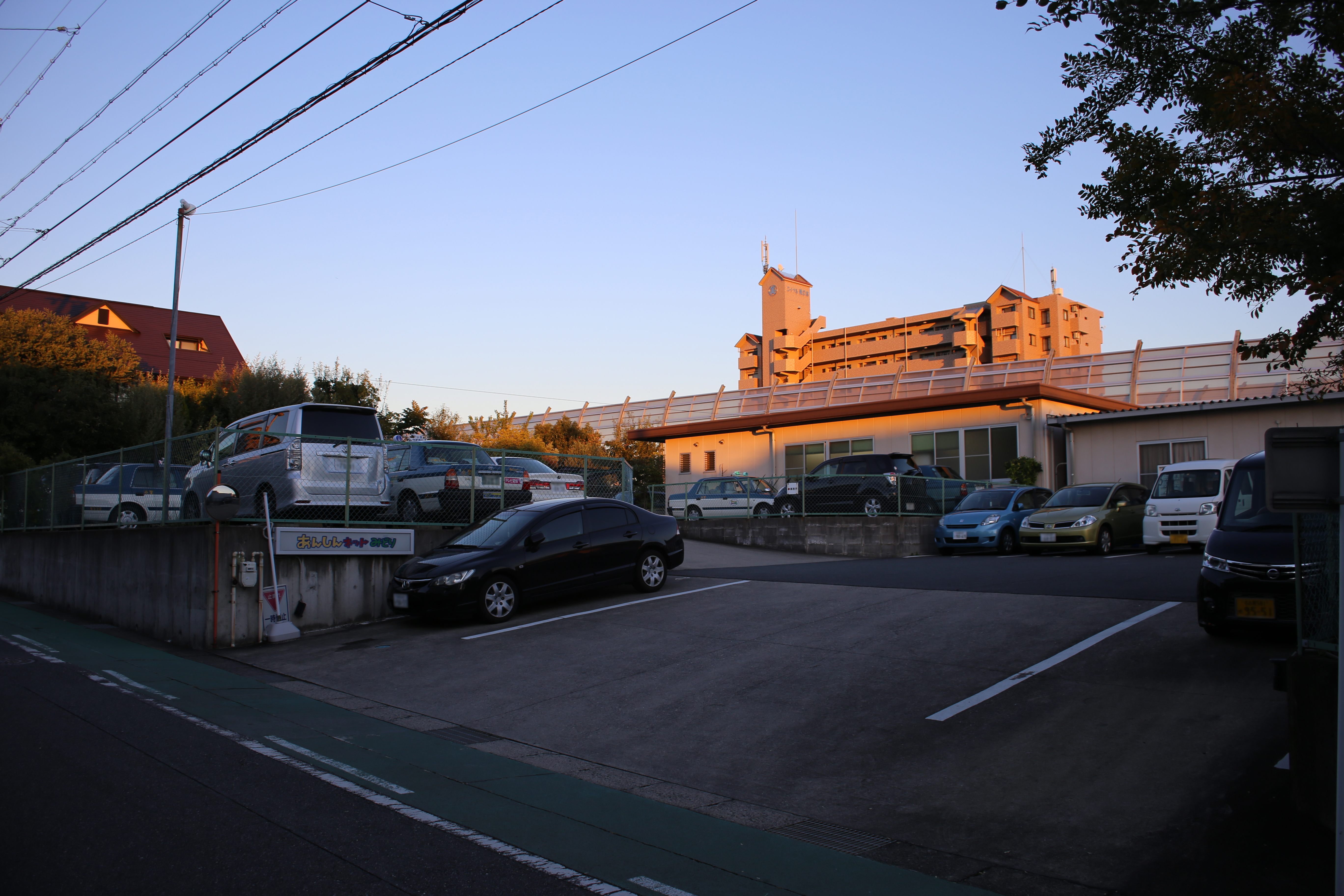 名古屋市緑区滝の水に所在するあんしんネットなごや緑営業所を北側公道西側より撮影